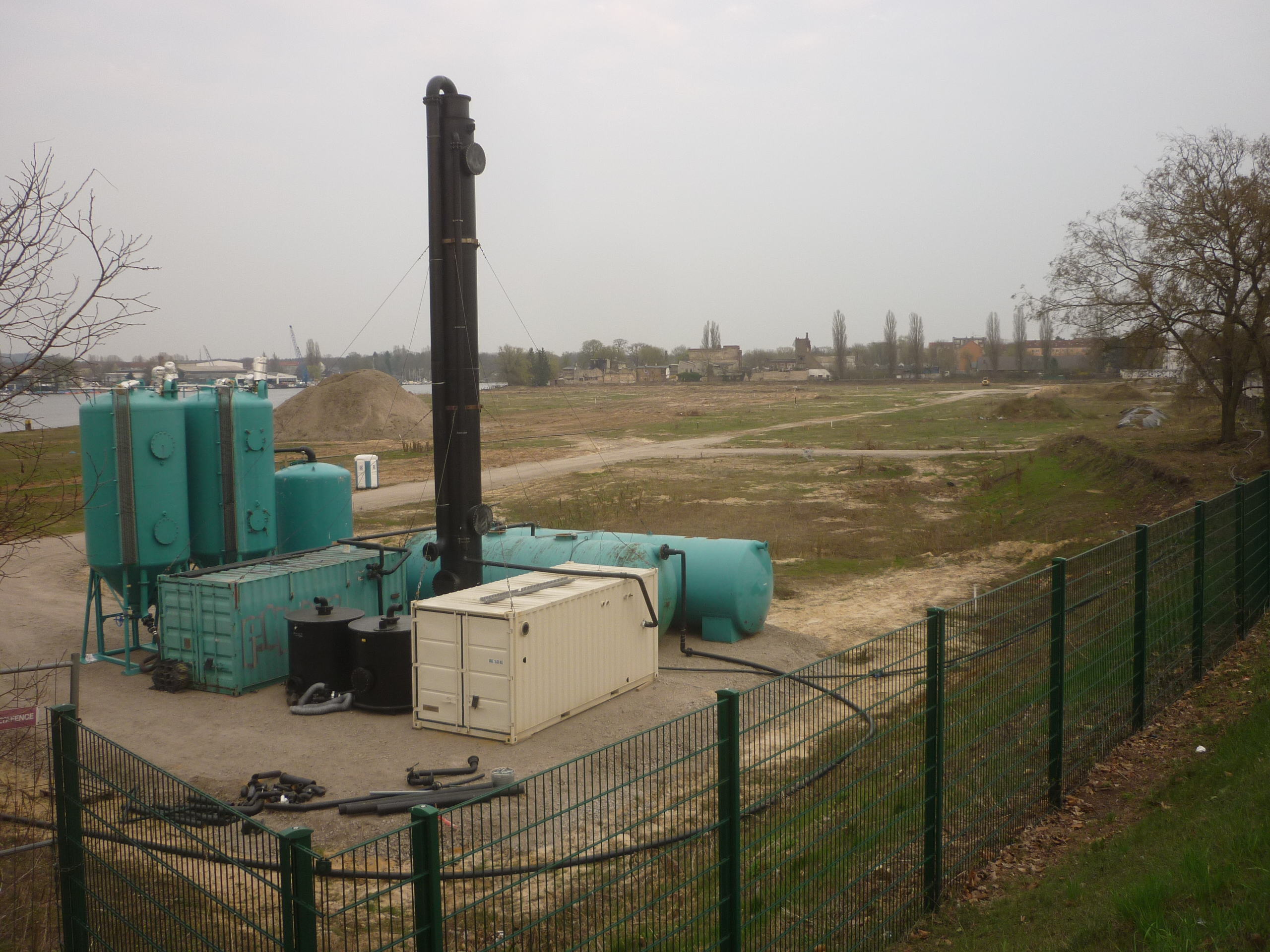 Freigeräumtes Gelände der ehemaligen Chemischen Fabrik Grünau, gegründet 1884 als Landshoff & Meyer, in der Regattastraße in Berlin-Grünau.